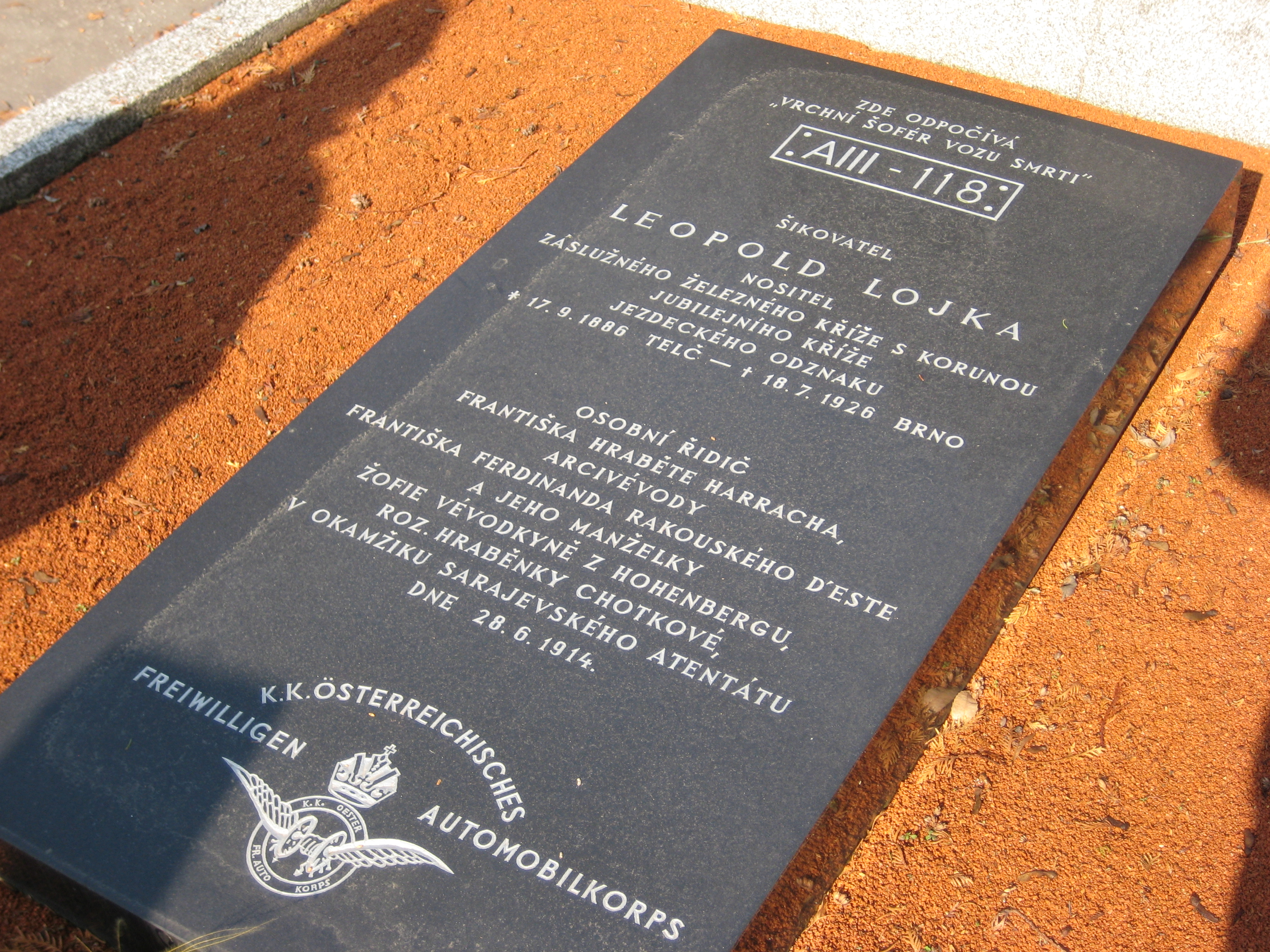 Grab Leopold Lojka, Brno